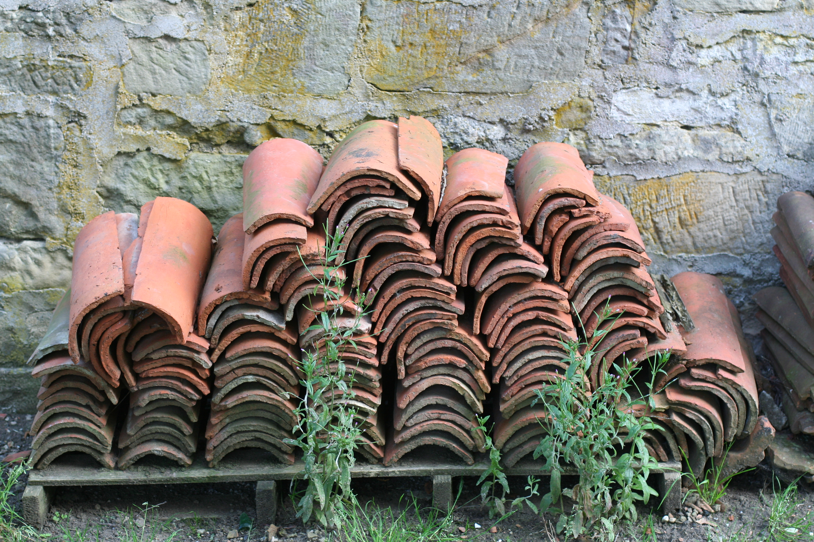 Tas de tuiles canal à padoux (Vosges)